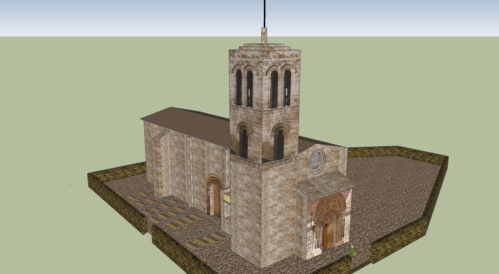 Iglesia de la Magdalena Tudela - Navarra - España (reconstrucción origen primitivo).